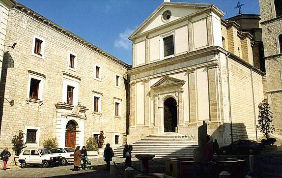 Potenza: la Cattedrale di San Gerardo Vescovo.